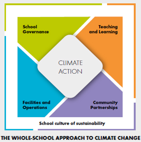 UNESCO, GAP